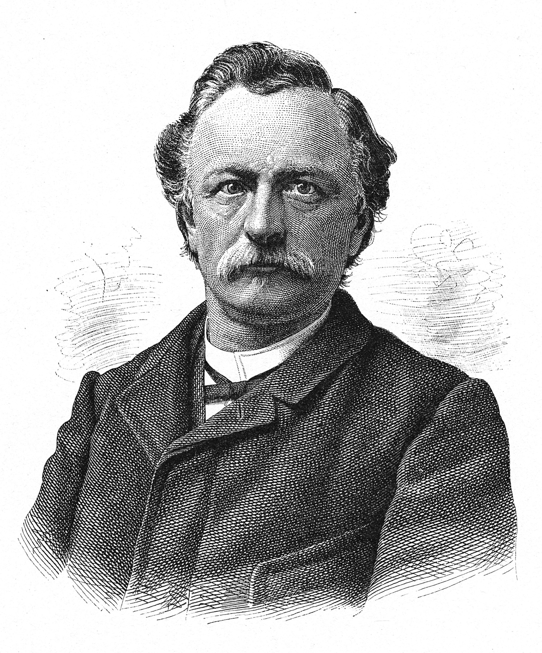 Strichklischee des Schweizer Politikers Karl Justin Sonderegger